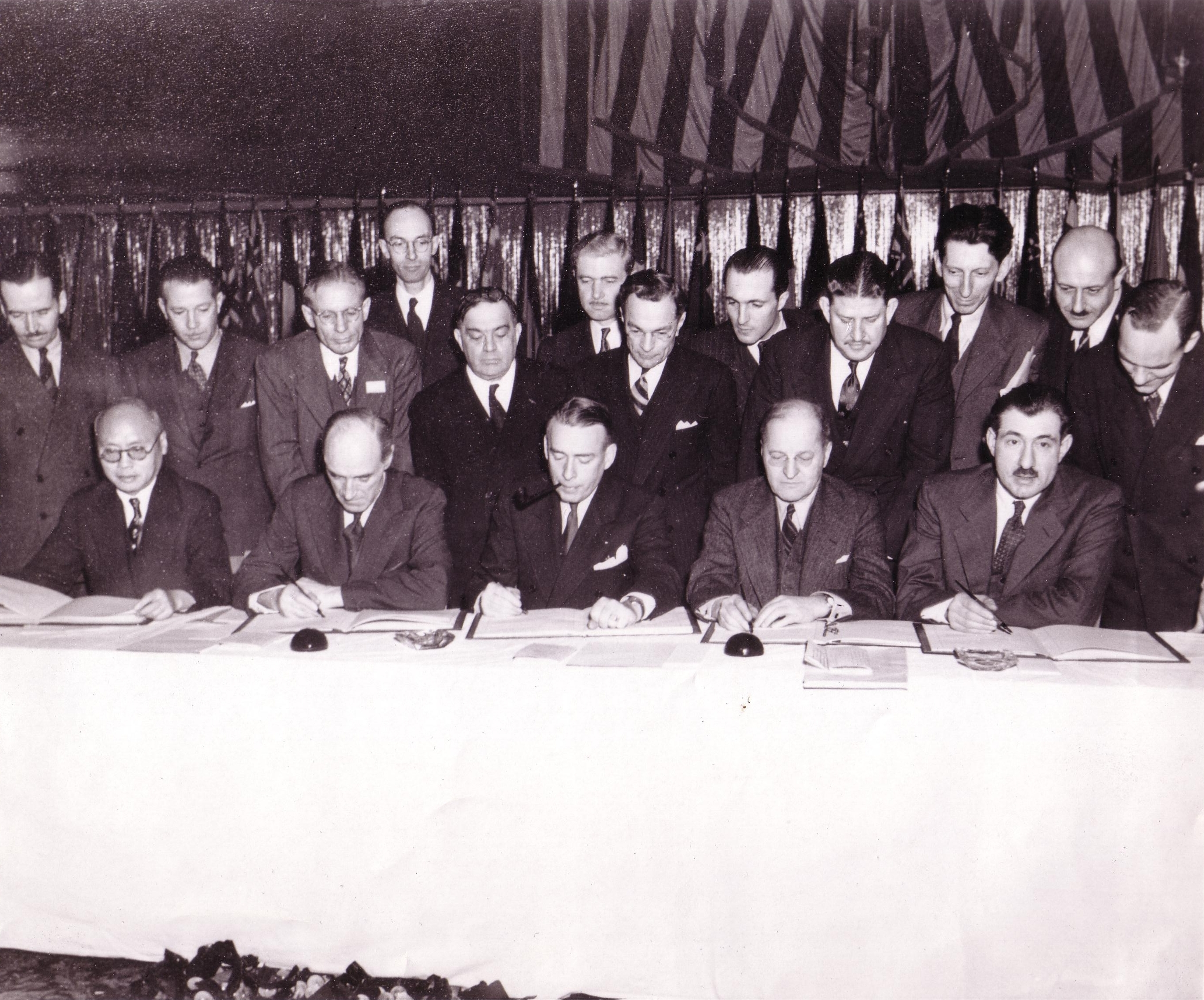 Signature de l'accord fondant l'Organisation de l'aviation civile internationale (OACI) à Chicago en 1944, avec Max Hymans à droite de l'image.